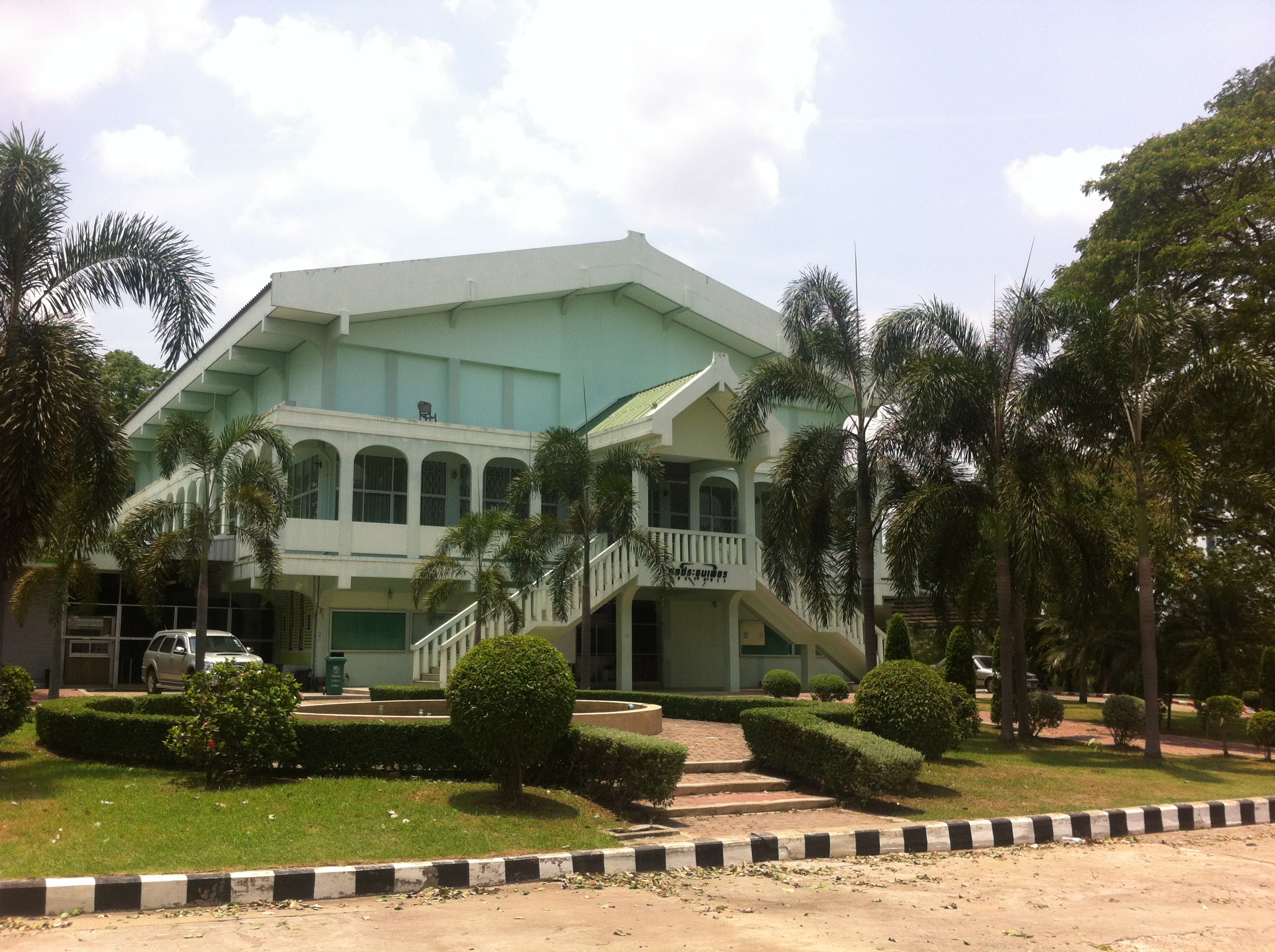 หอประชุมเพชร หอประชุมใหญ่